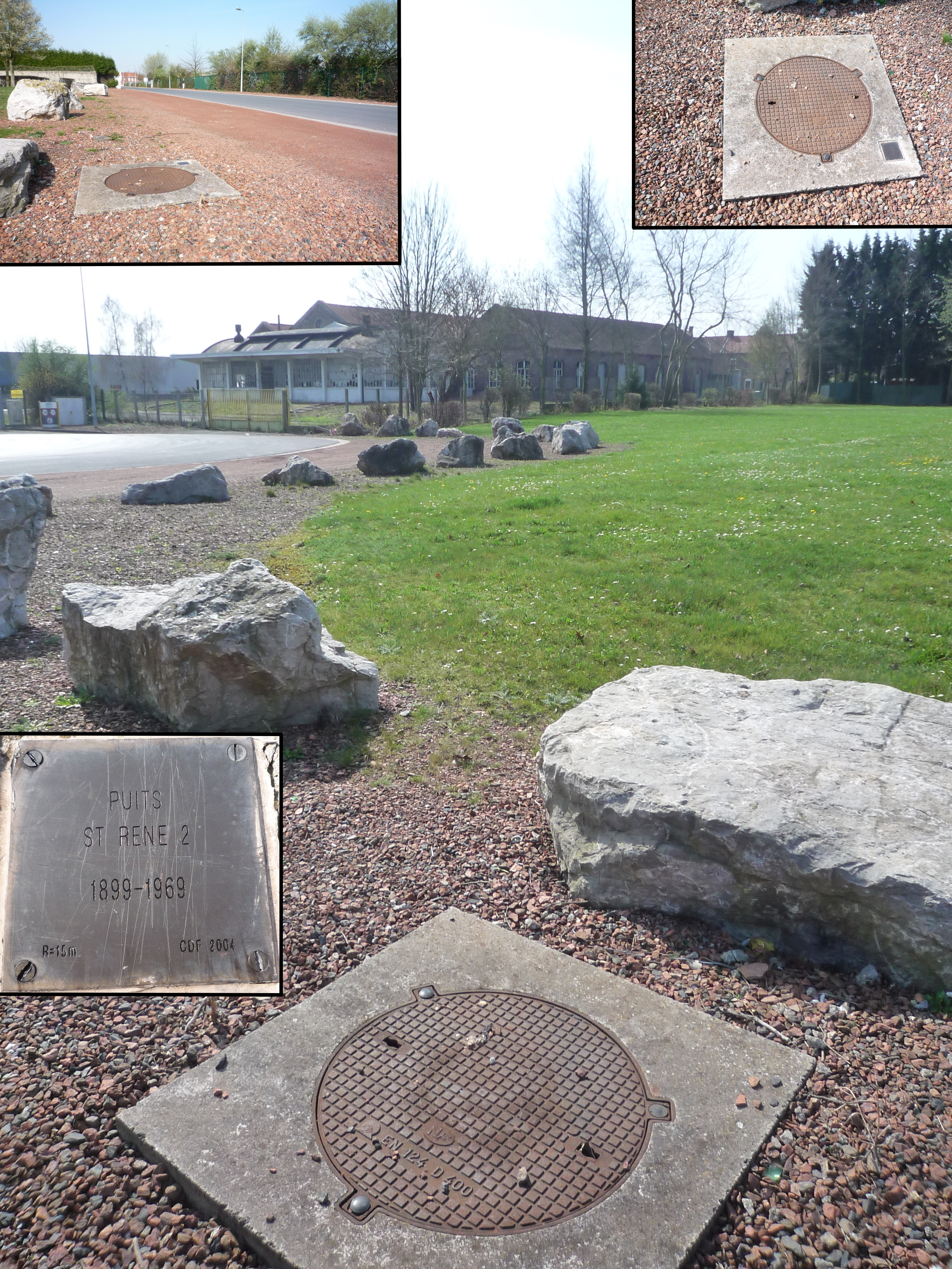 La Fosse Saint René de la Compagnie des mines d'Aniche était un charbonnage constitué de deux puits situé à Guesnain, Nord, Nord-Pas-de-Calais, France.